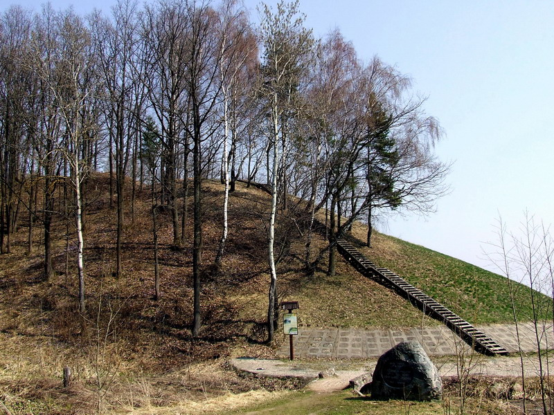 Vieškūnų piliakalnis, Kaunas.